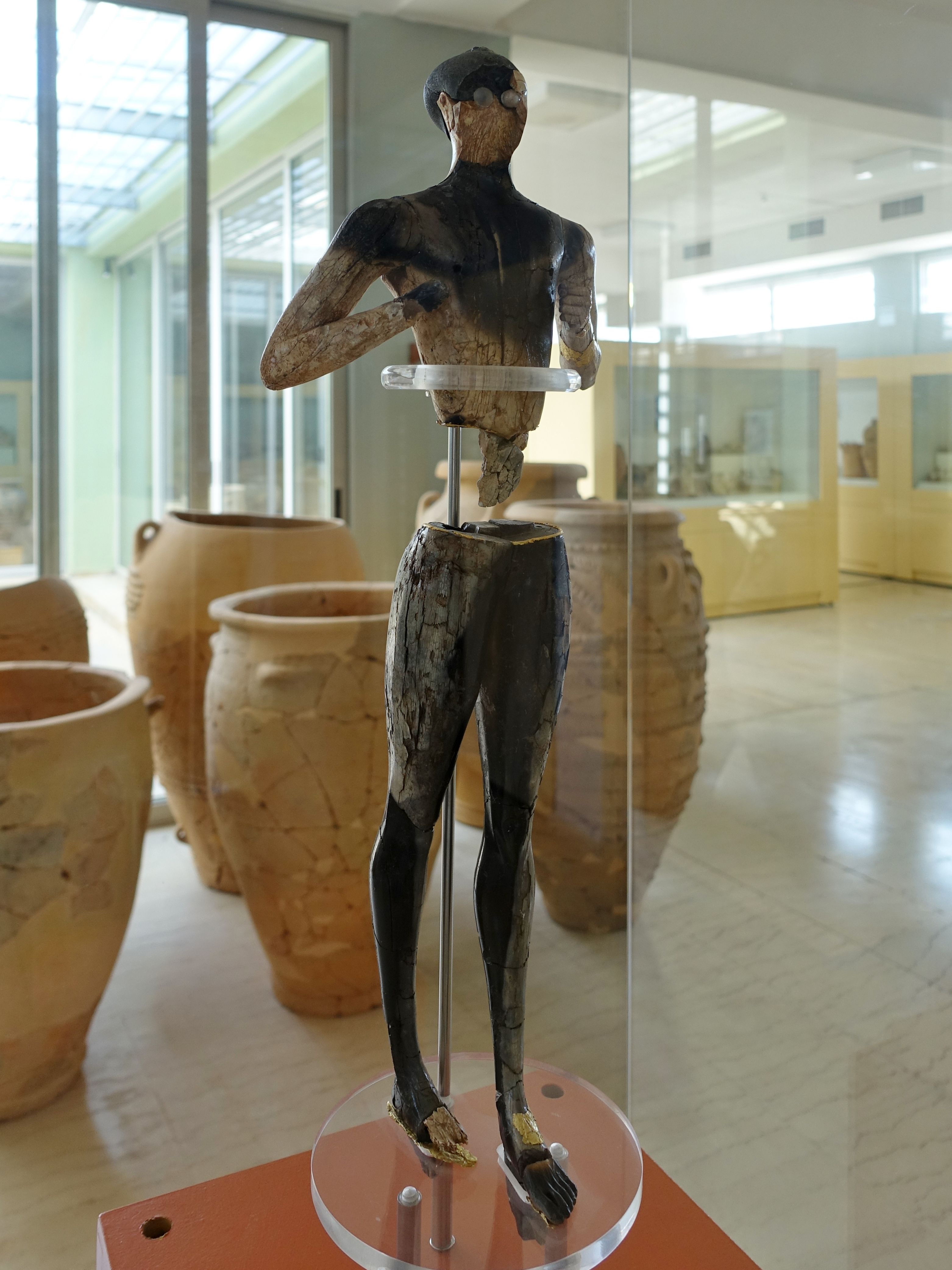 Kouros von Palaikastro (1480–1425 v. Chr.), minoische Götterstatue aus Haus 5 der Ausgrabungsstätte von Roussolakkos, Archäologisches Museum von Sitia, Kreta, Griechenland